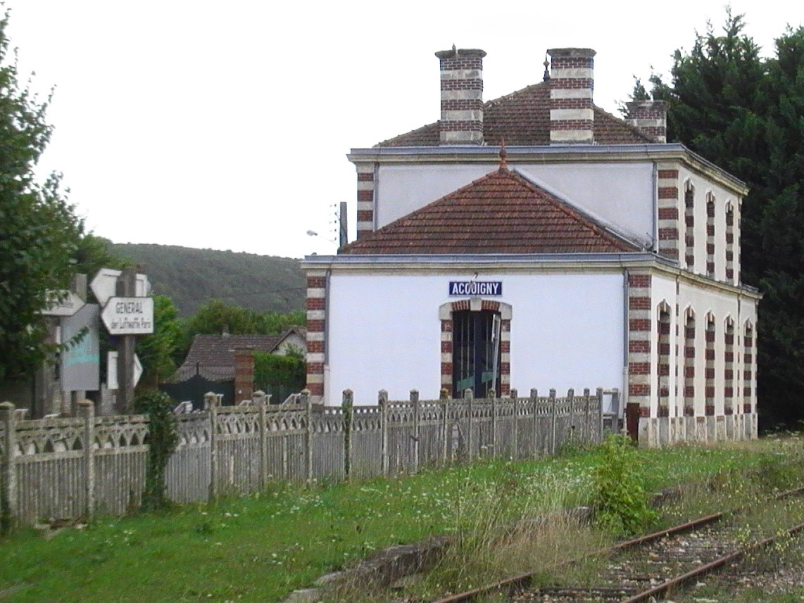 Environs des (anciennes) dépendances ferroviaires de la gare d'Acquigny.